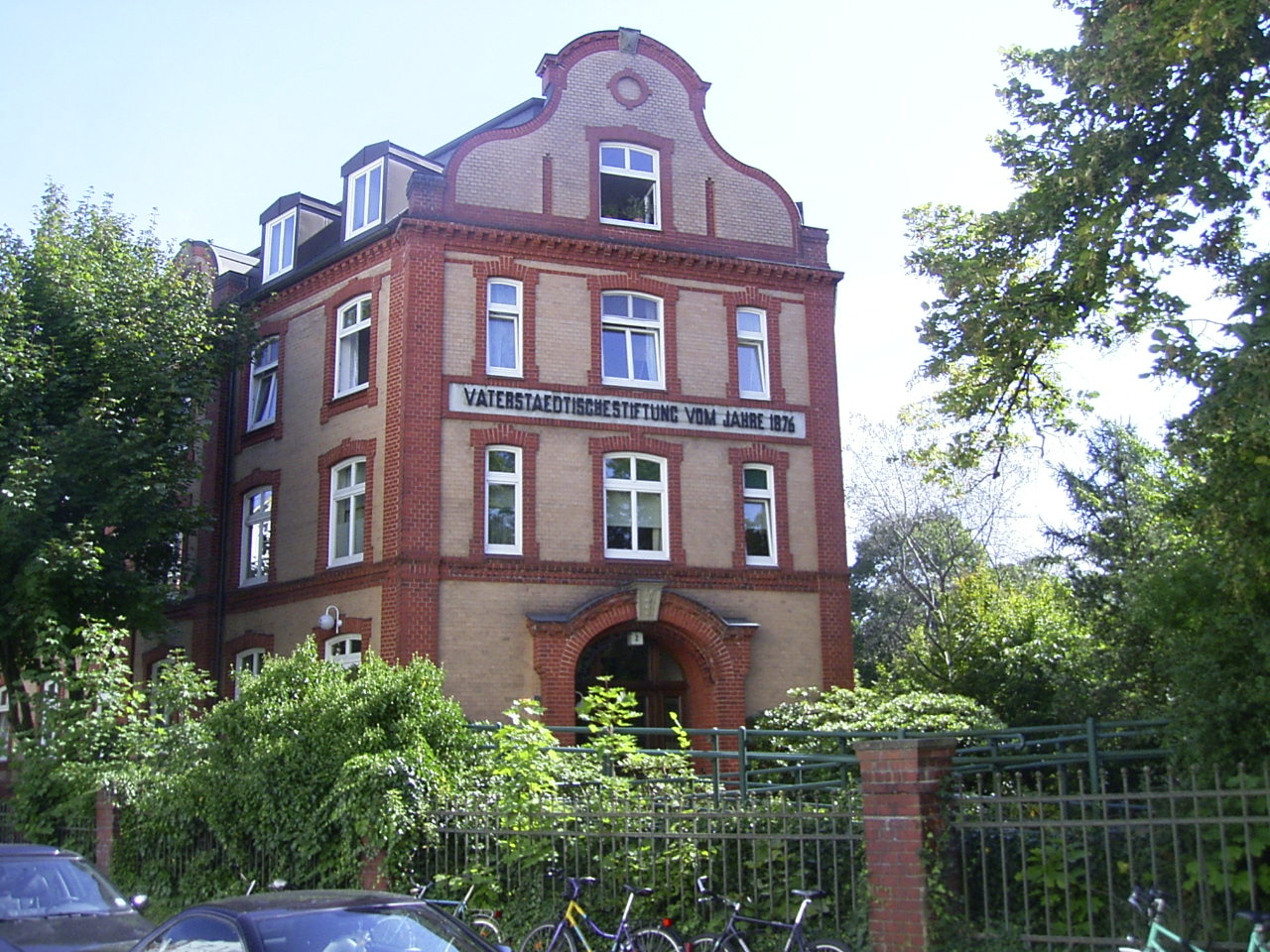 Das Gustav-Kaemmerer-Stift der Vaterstädtischen Stiftung in der Schedestraße 2 in Eppendorf wurde 1909 von Stammann & Zinnow erbaut. This is a photograph of an architectural monument.